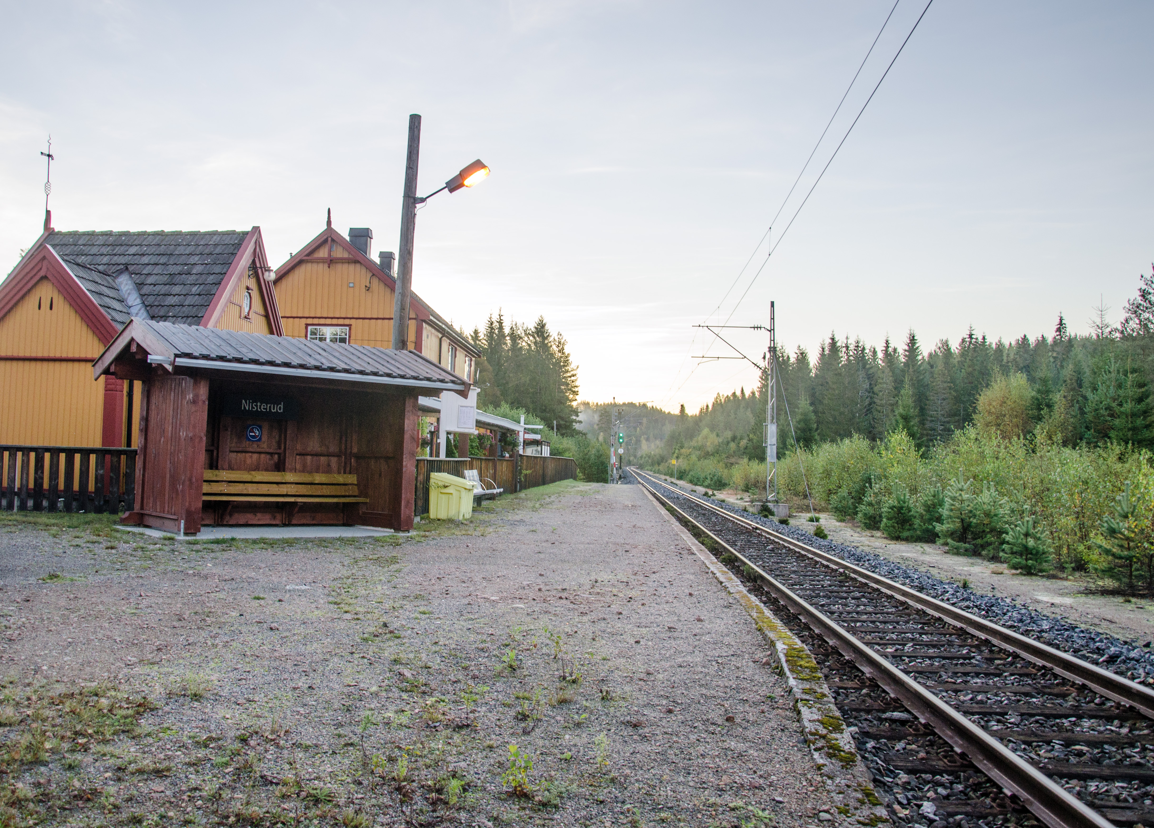 Nisterud stasjon